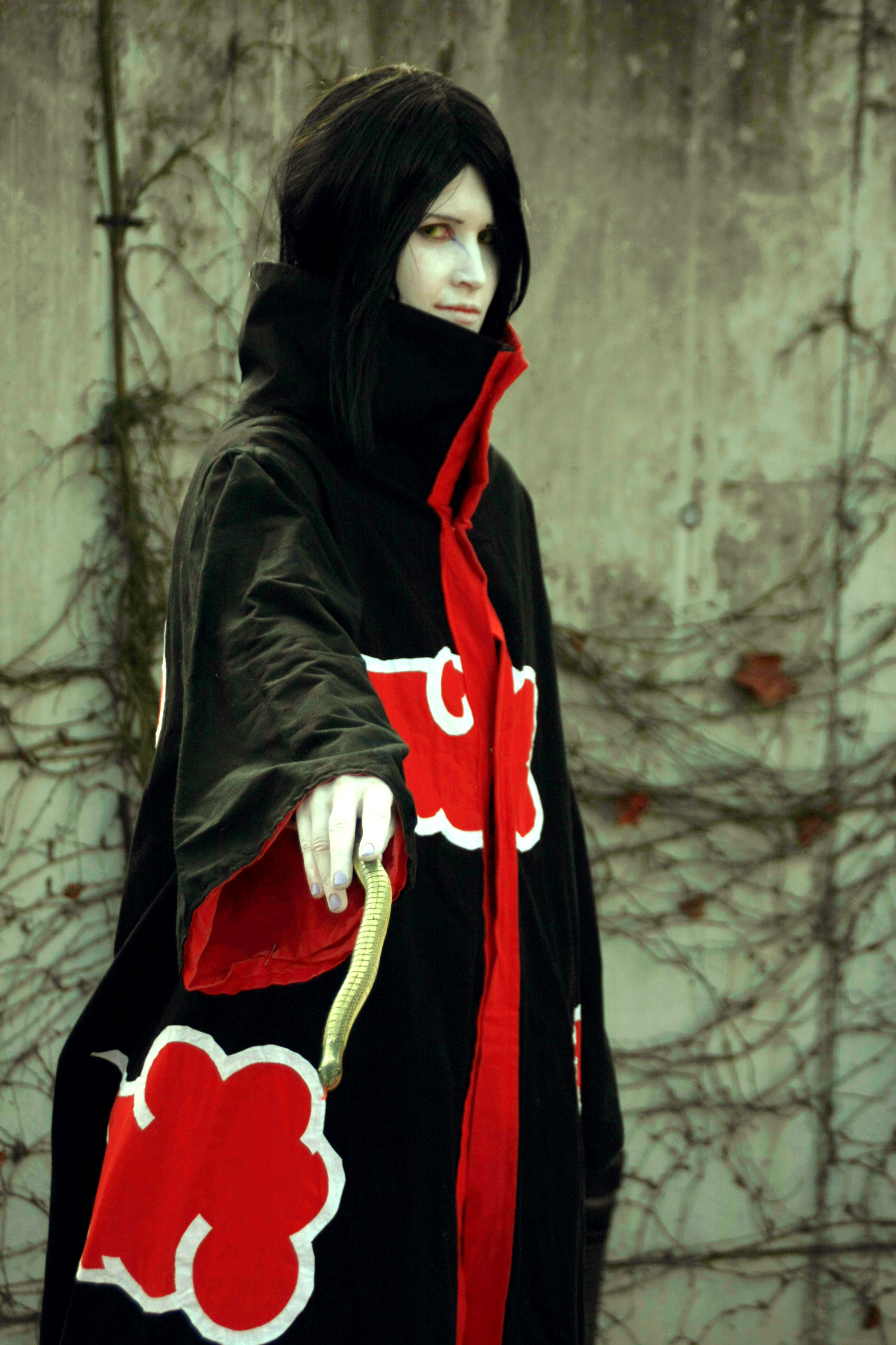 Orochimaru [Akatsuki Version] (Naruto)